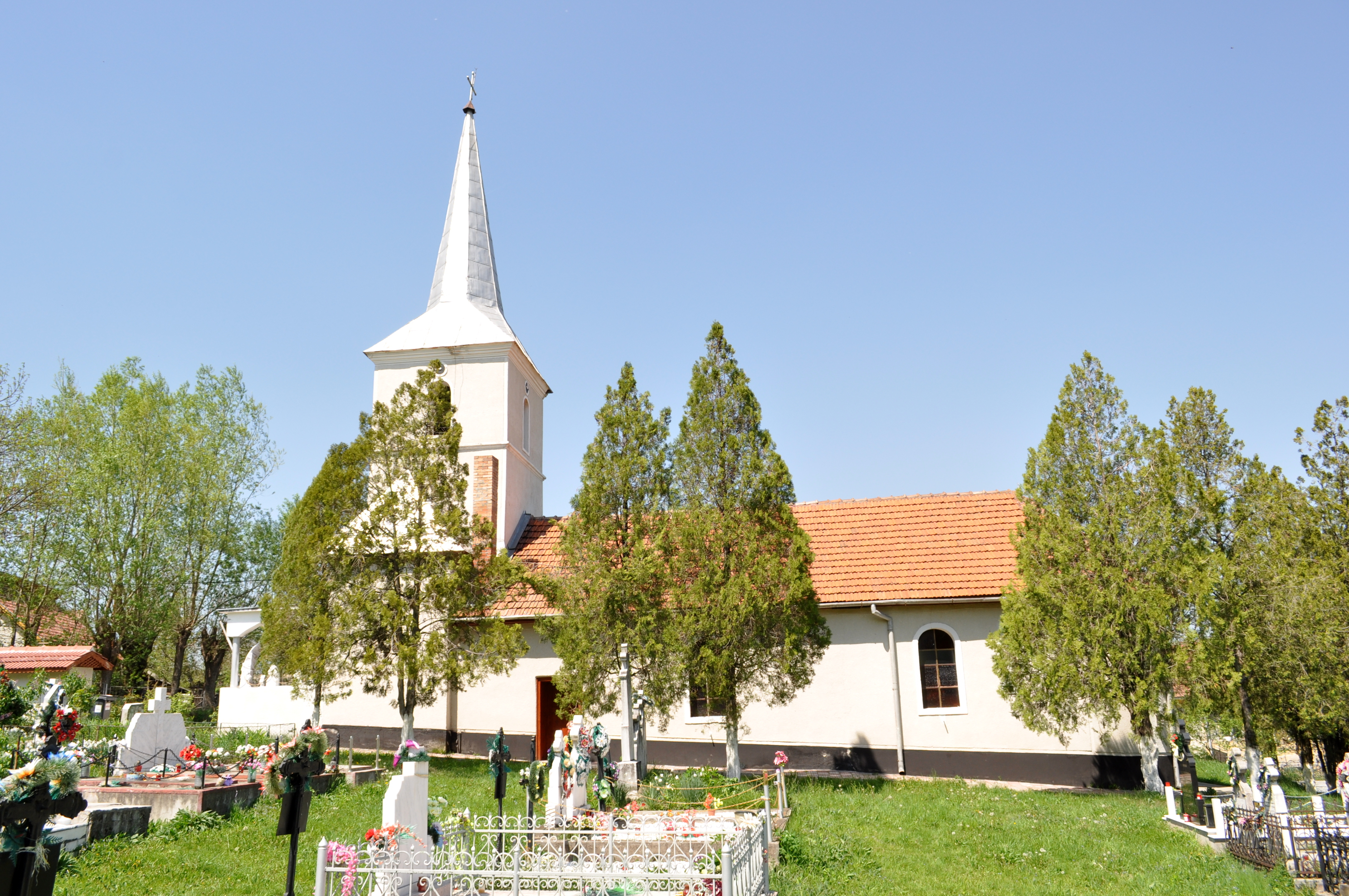 Biserica "Sf. Ioan Botezătorul" , sat CLOPOTIVA; comuna RÂU DE MORI